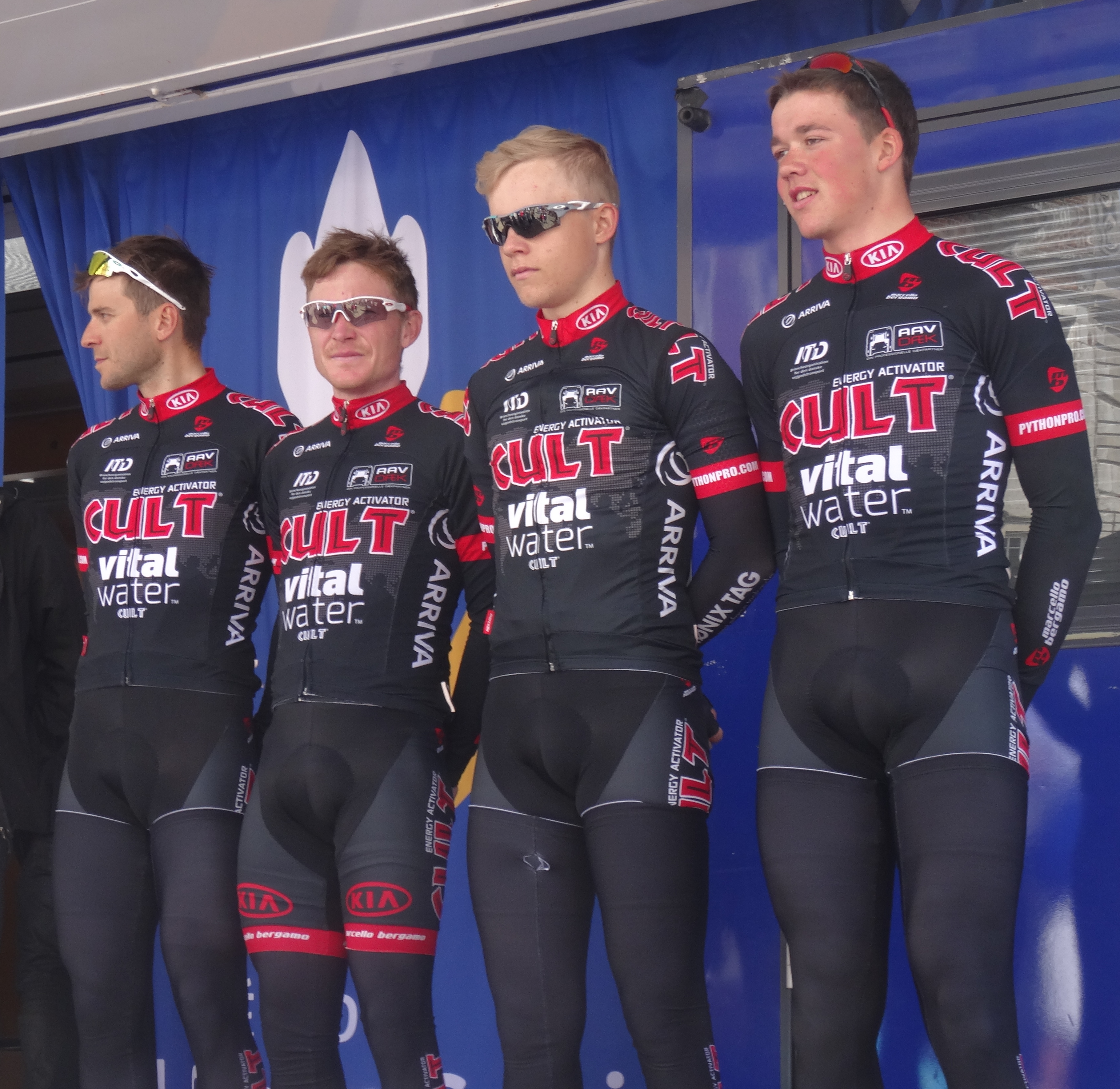 Reportage photographique réalisé le dimanche 25 mai 2014 à l'occasion du départ et de l'arrivée de la troisième étape du Paris-Arras Tour 2014 à Arras, Pas-de-Calais, Nord-Pas-de-Calais, France. Depicted team: Cult Energy Vital Water